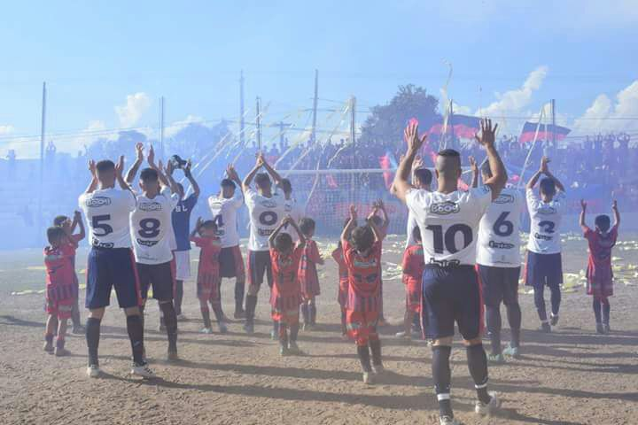 Recibimiento de la gente de San Lorenzo